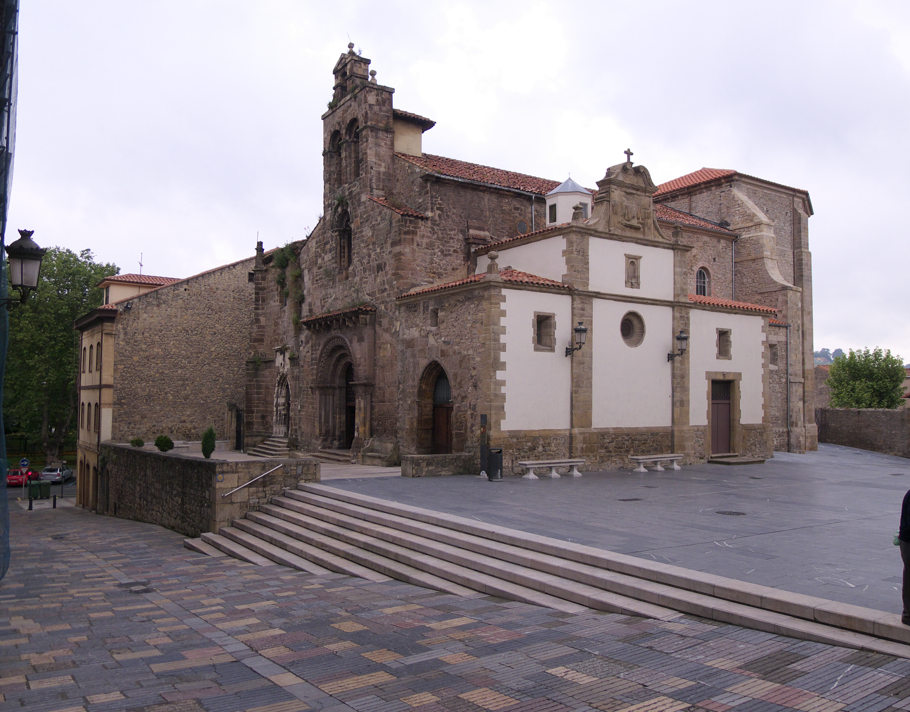 Sus orígenes son del siglo XII. La portada de los pies es un buen ejemplar románico.